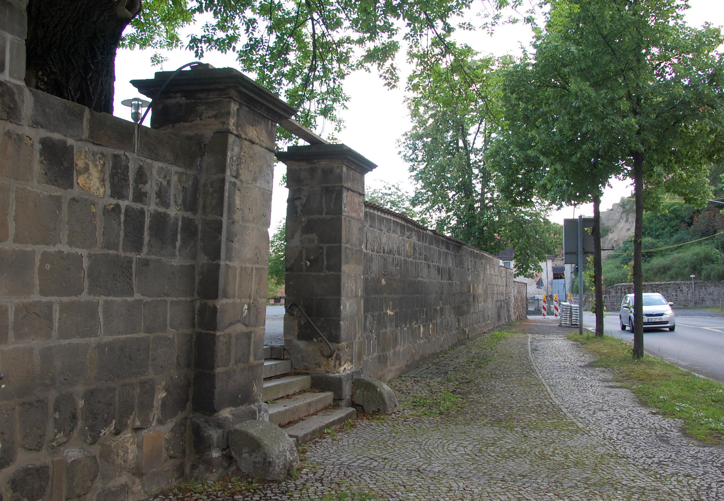 Grundstück Wipertistraße 2 in Quedlinburg